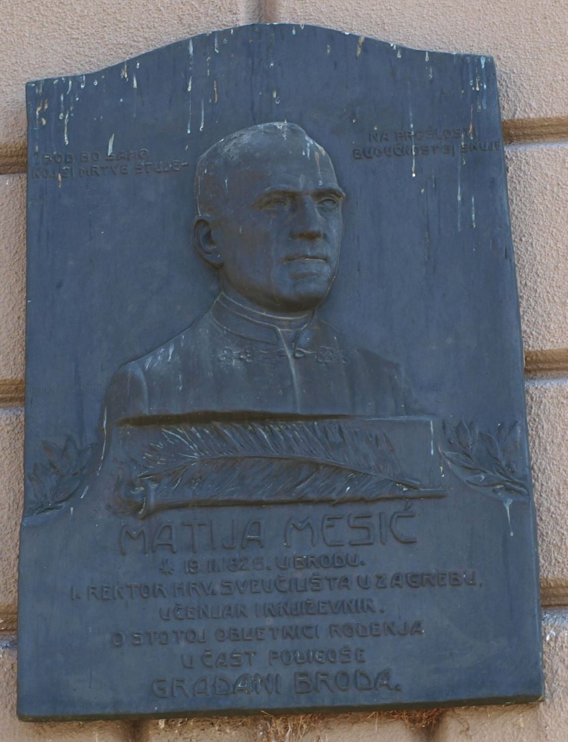 Spomen ploča Matiji Mesiću na strojarskom fakultetu u Slavonskome Brodu.